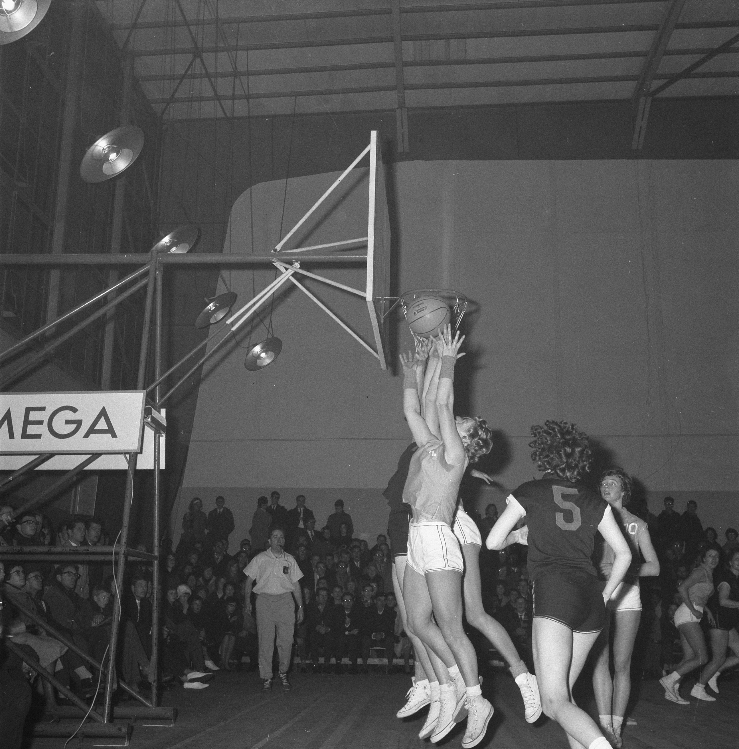 Collectie / Archief : Fotocollectie Anefo Reportage / Serie : [ onbekend ] Beschrijving : Basketball Nederland tegen Belgie (dames) Datum : 17 februari 1962 Locatie : België, Nederland Trefwoorden : BASKETBAL Fotograaf : Nijs, Jac. de / Anefo Auteursrechthebbende : Nationaal Archief Materiaalsoort : Negatief (zwart/wit) Nummer archiefinventaris : bekijk toegang 2.24.01.03 Bestanddeelnummer : 913-5361